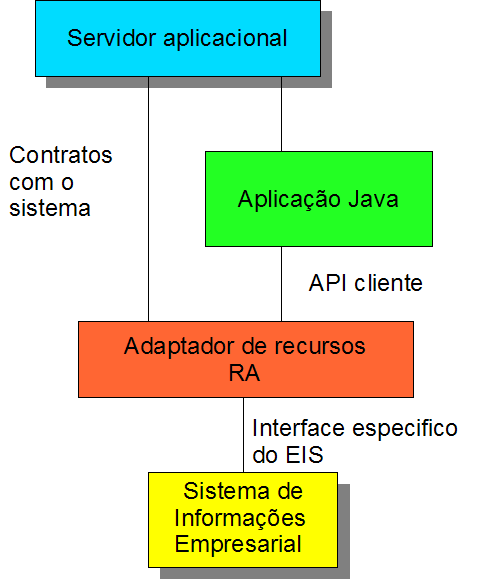 Contratos entre as vÃ¡rias componentes disponÃ­veis no JCA. A imagem foi criada em Open Office e exportada para PNG.